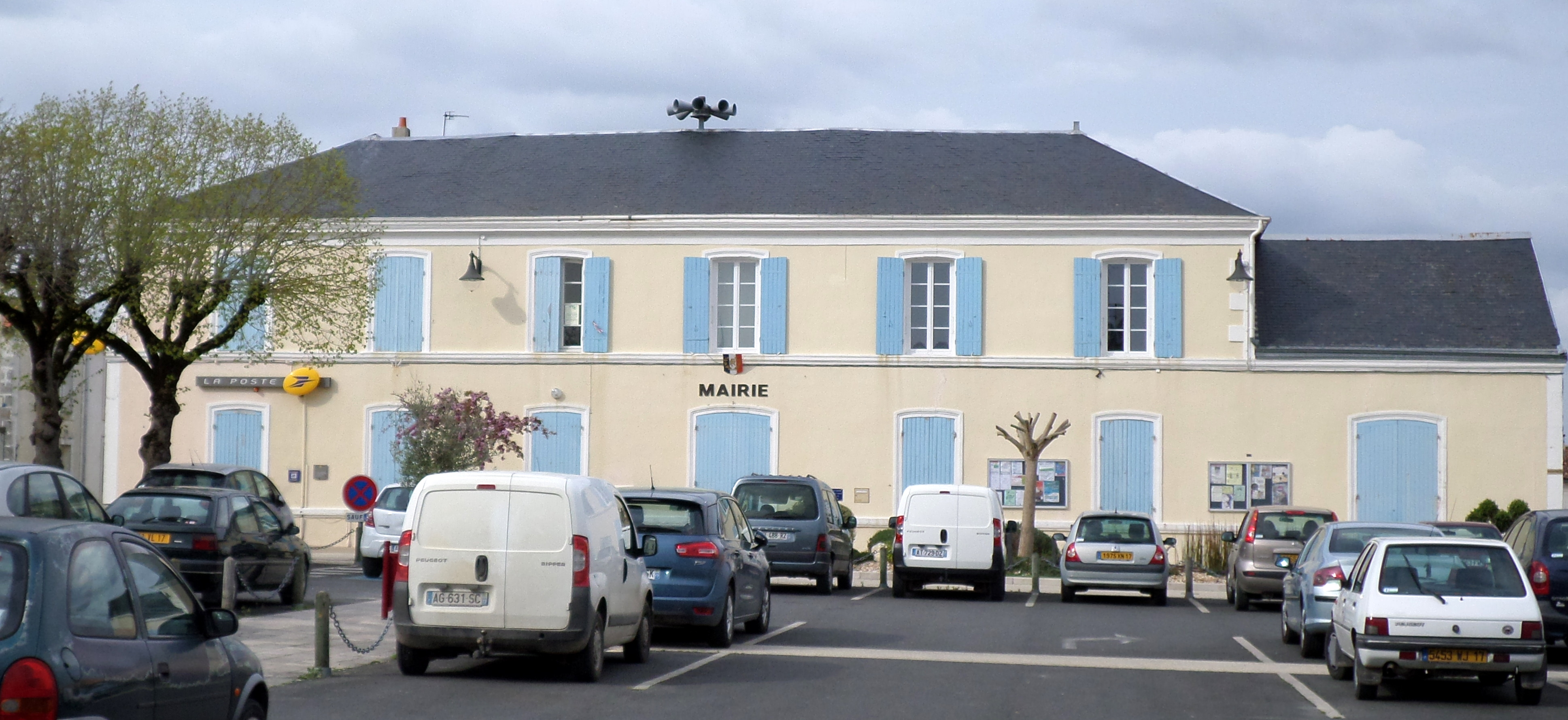 Loulay, Bro-C'hall, ti-kêr